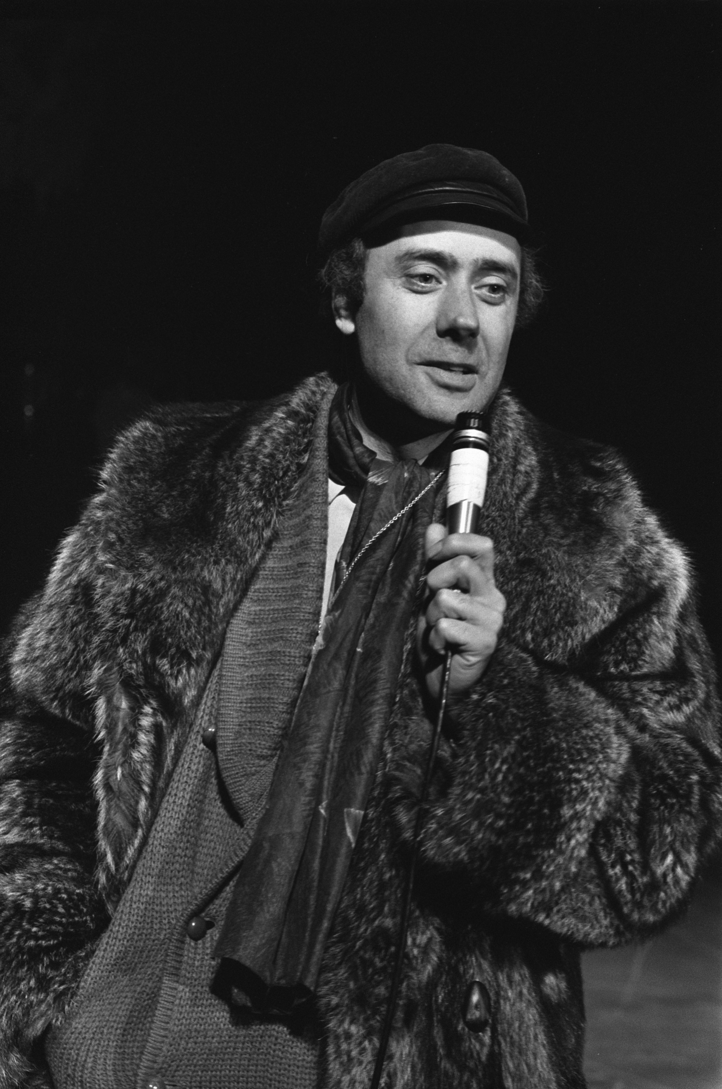 Collectie / Archief : Fotocollectie Anefo Reportage / Serie : [ onbekend ] Beschrijving : Voorpremiere "Hair" in Amsterdam. Regisseur Victor Spinetti Datum : 30 december 1969 Locatie : Amsterdam, Noord-Holland Trefwoorden : Voorpremieres Persoonsnaam : Regisseur Victor Fotograaf : Verhoeff, Bert / Anefo Auteursrechthebbende : Nationaal Archief Materiaalsoort : Negatief (zwart/wit) Nummer archiefinventaris : bekijk toegang 2.24.01.05 Bestanddeelnummer : 923-1143